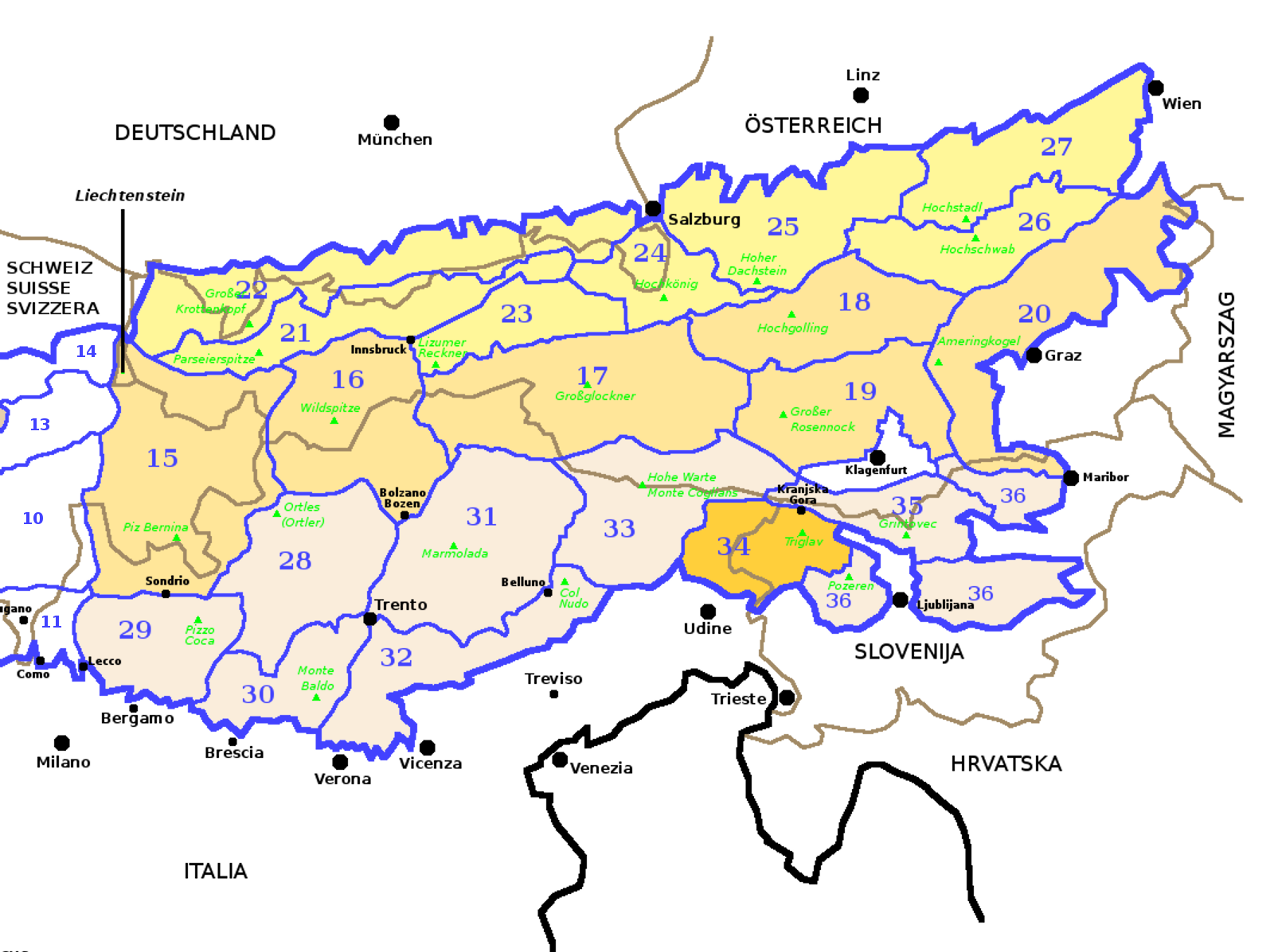 Alpi Orientali secondo la SOIUSA con evidenziate le Alpi e Prealpi Giulie